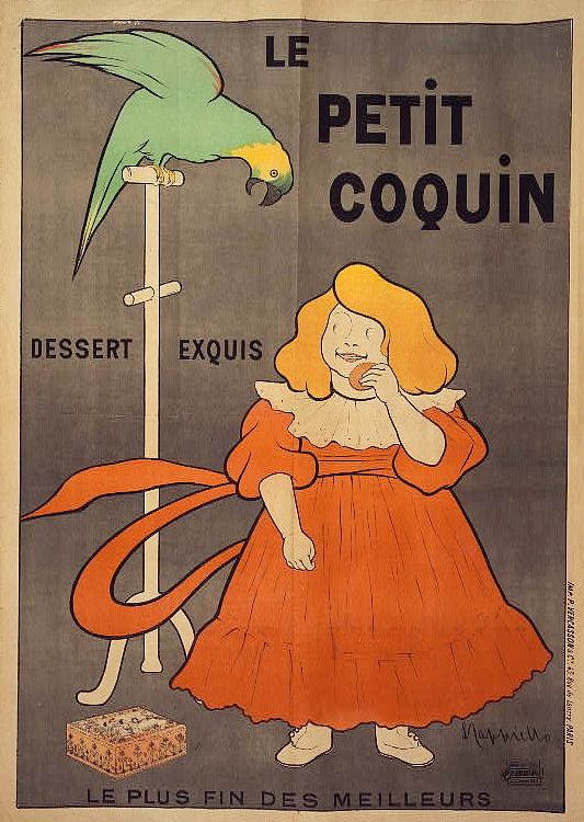 Leonetto Cappiello (1875-1942): Le petit coquin, dessert exquis